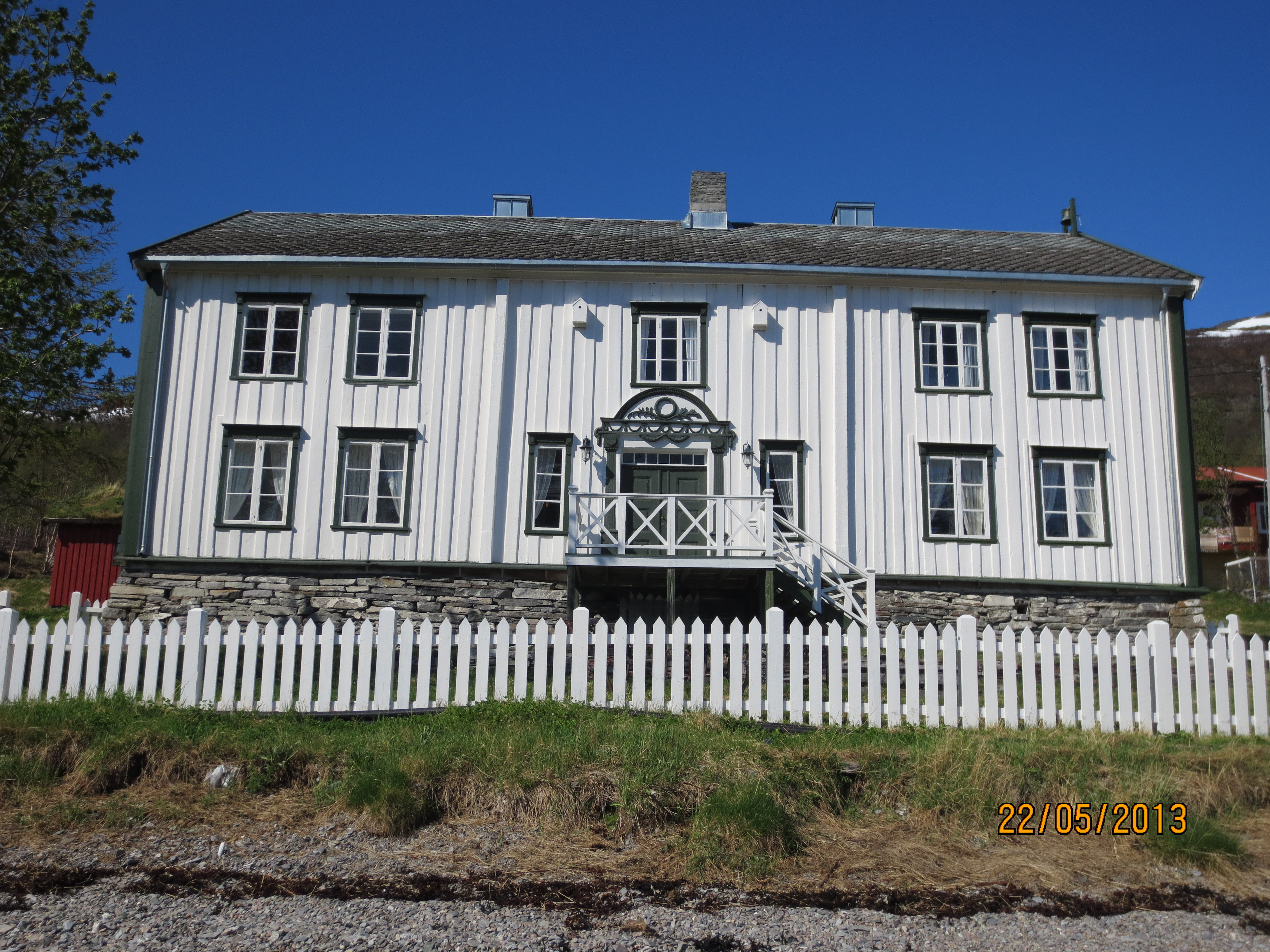 Maursund handelsstad i Skjervøy kommune. Tilhøyrer Nord-Troms museum